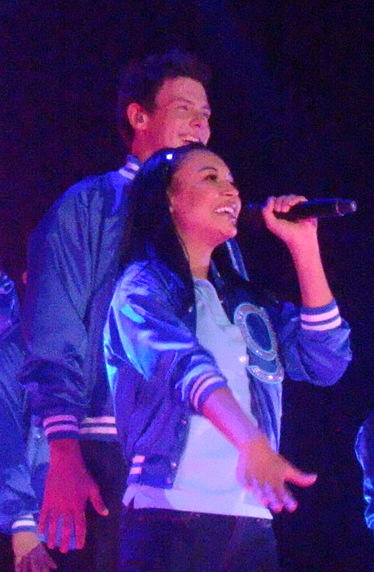 Somebody To Love